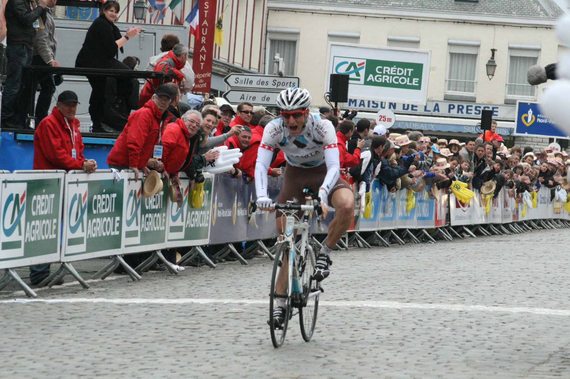 Martin Elmiger remporte la 4e étape des Quatre jours de Dunkerque 2010 à Cassel